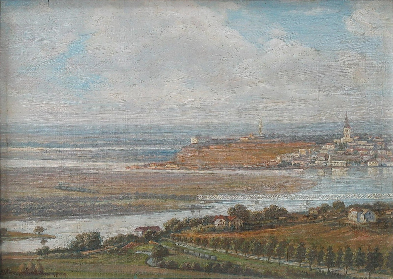 PANORAMA BEOGRADA